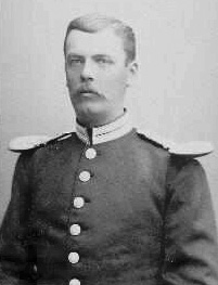 John Mauritz Klingspor 1894. Major vid Svea Livgarde